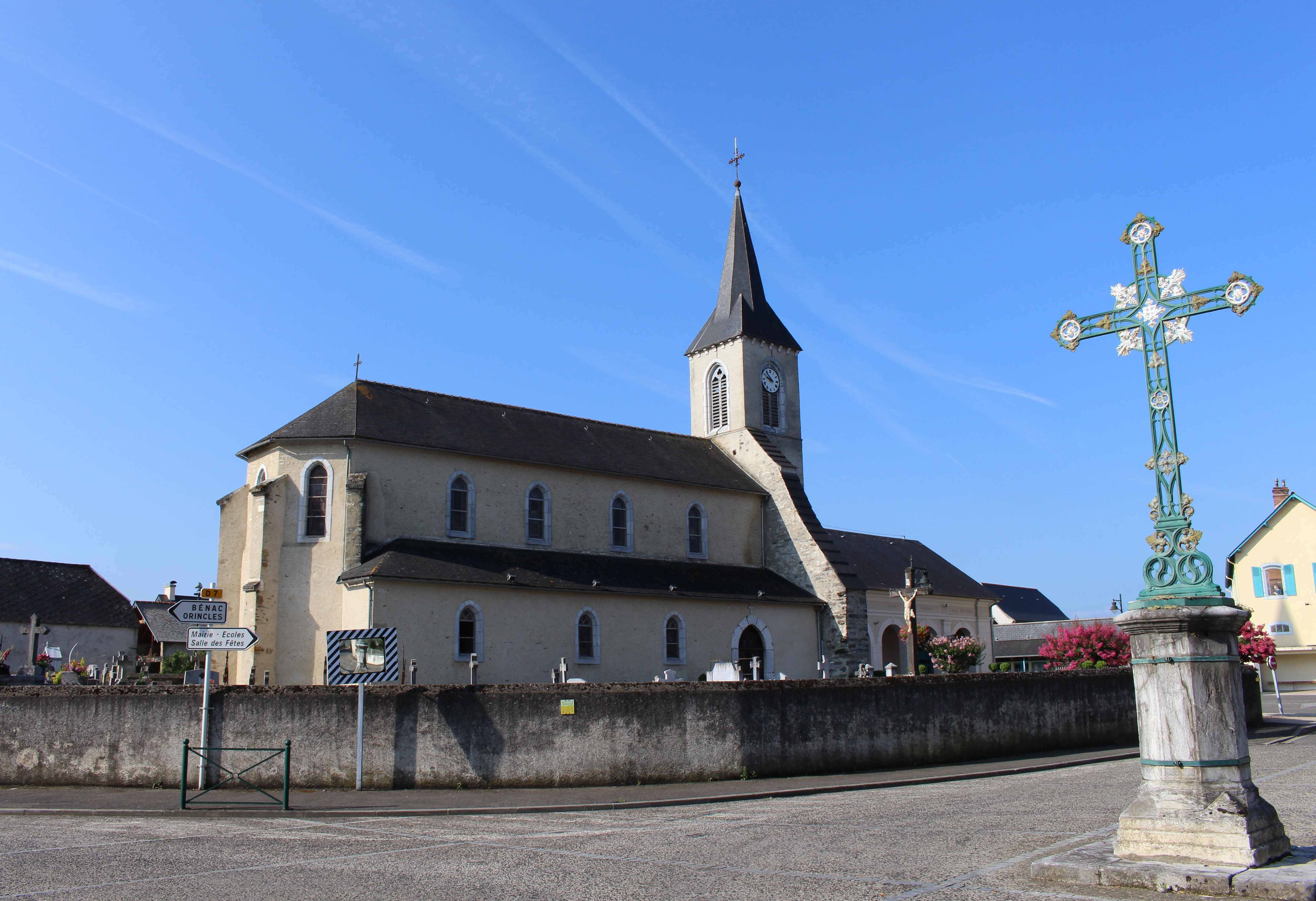 Église Saint Saturnin de Louey (Hautes-Pyrénées)